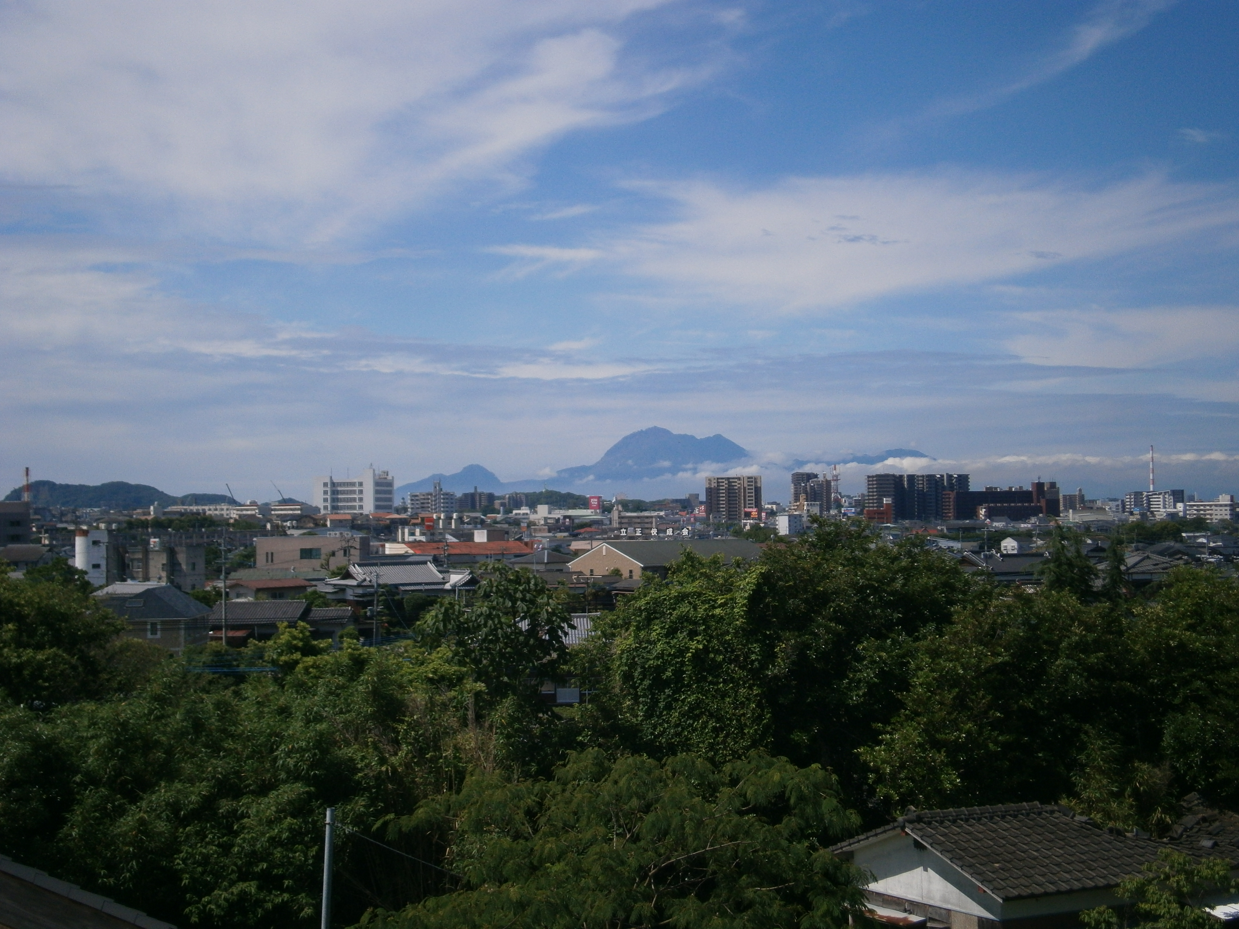 大牟田市街地及び雲仙岳